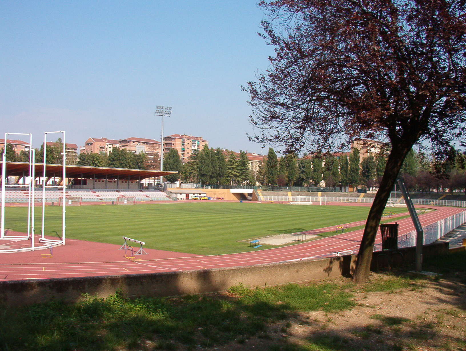 Stadio Primo Nebiolo - Parco Ruffini - Torino - Italy